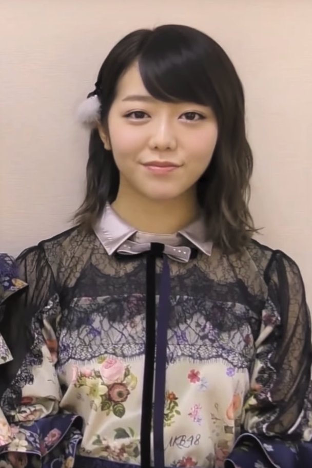 AKB48 Group大前輩 #柏木由紀 #指原莉乃 #峯岸みなみ來將經驗分享給TPE48參賽女孩們，呼籲大家要繼續支持喜歡的女孩喔！